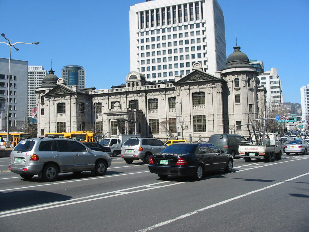 한국은행 본관